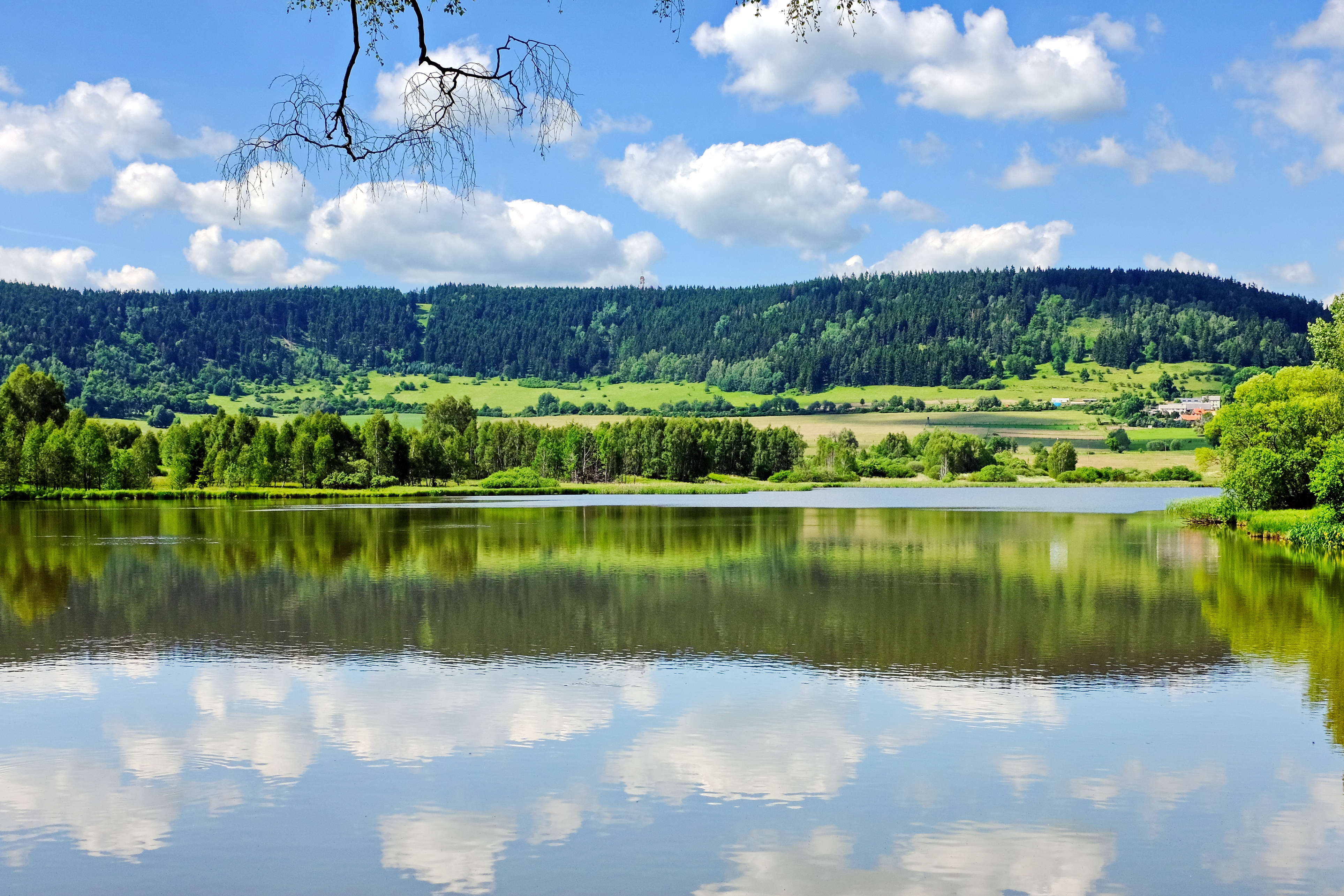 Třebouňský vrch, Tepelská vrchovina, okres Karlovy Vary